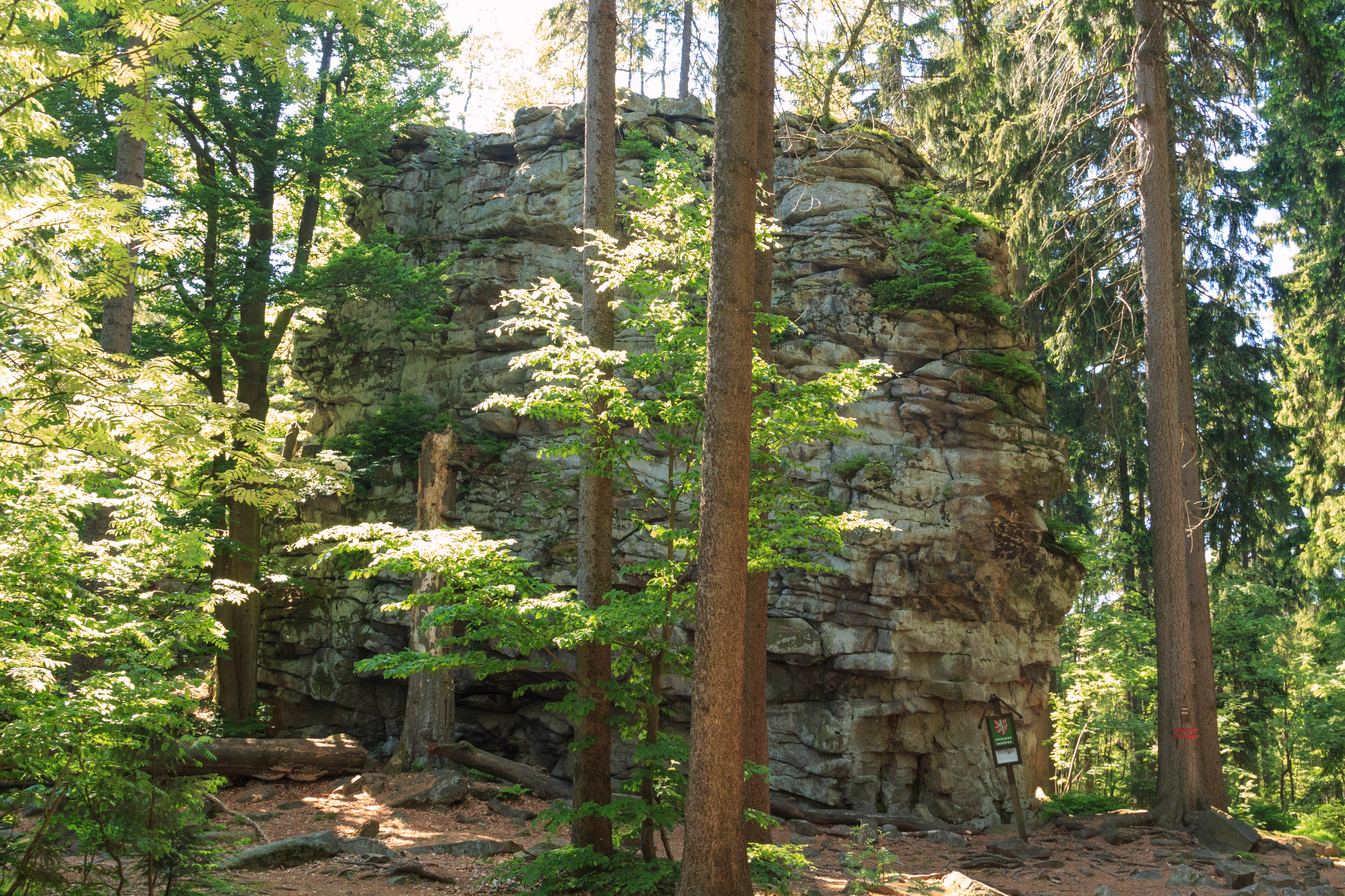 PP Lisovská skála Project: Chráněná území.